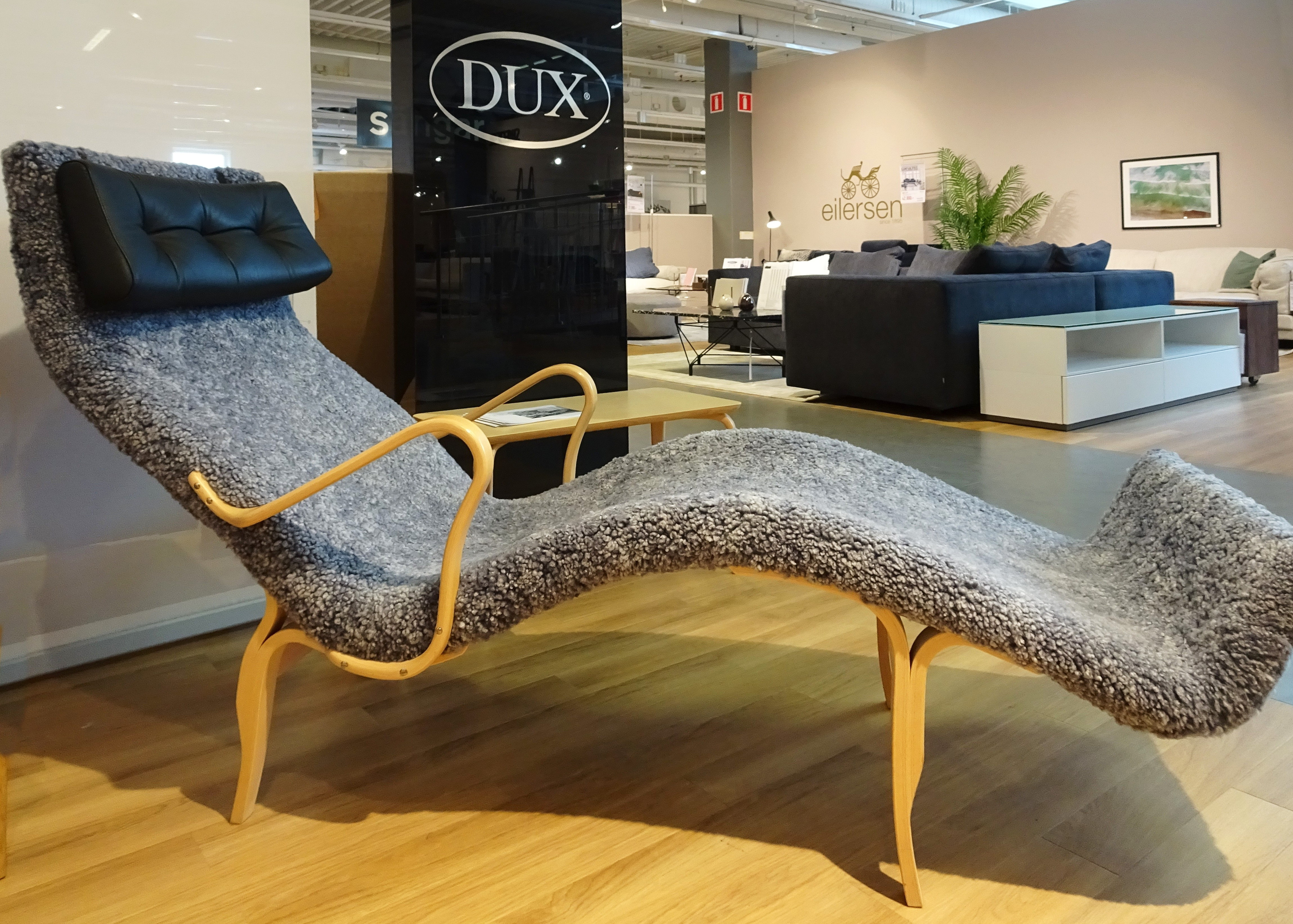 Bruno Mathsson, "Pernilla 3"